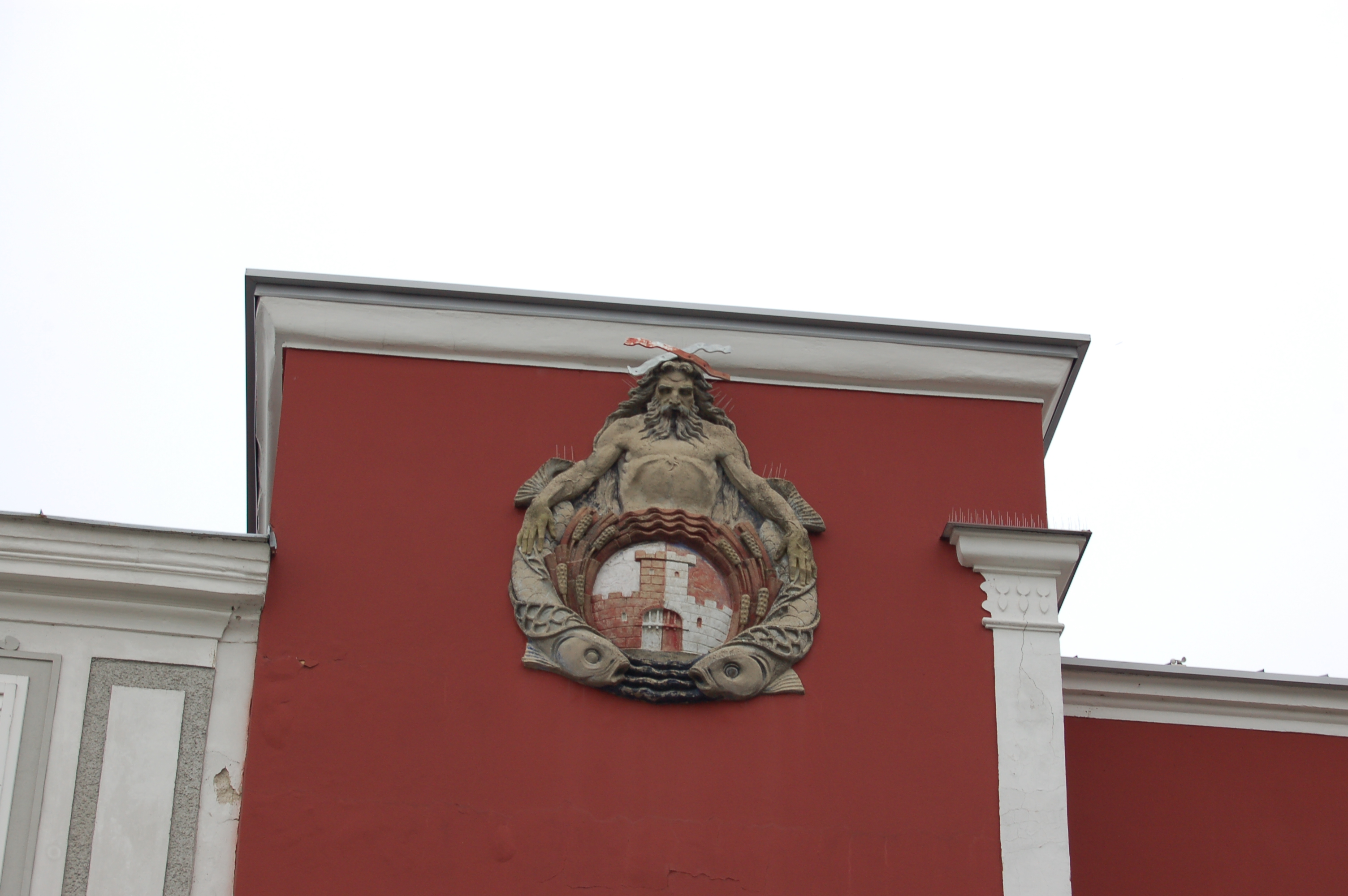 Das Alte Rathaus am Stadtplatz 14 in Eferding, Oberösterreich.